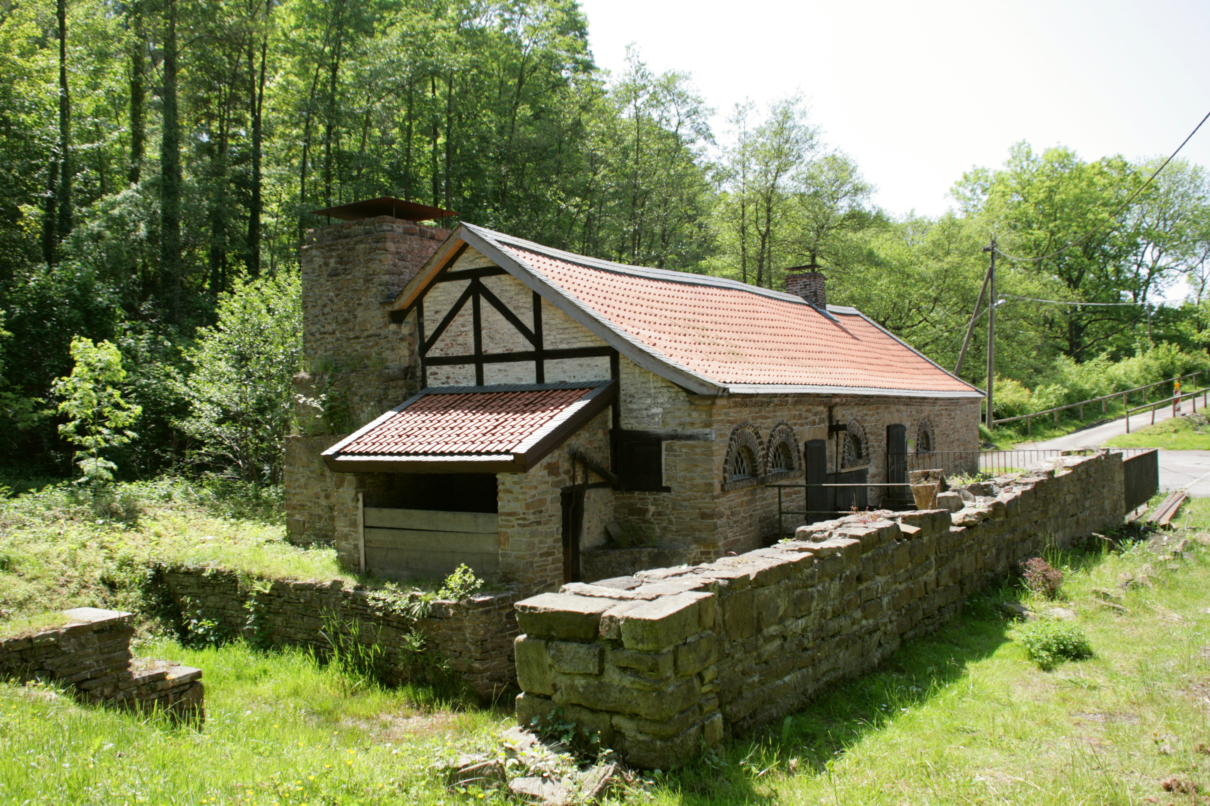 Deilbachhammer, Eisenhammerweg in Essen-Kupferdreh